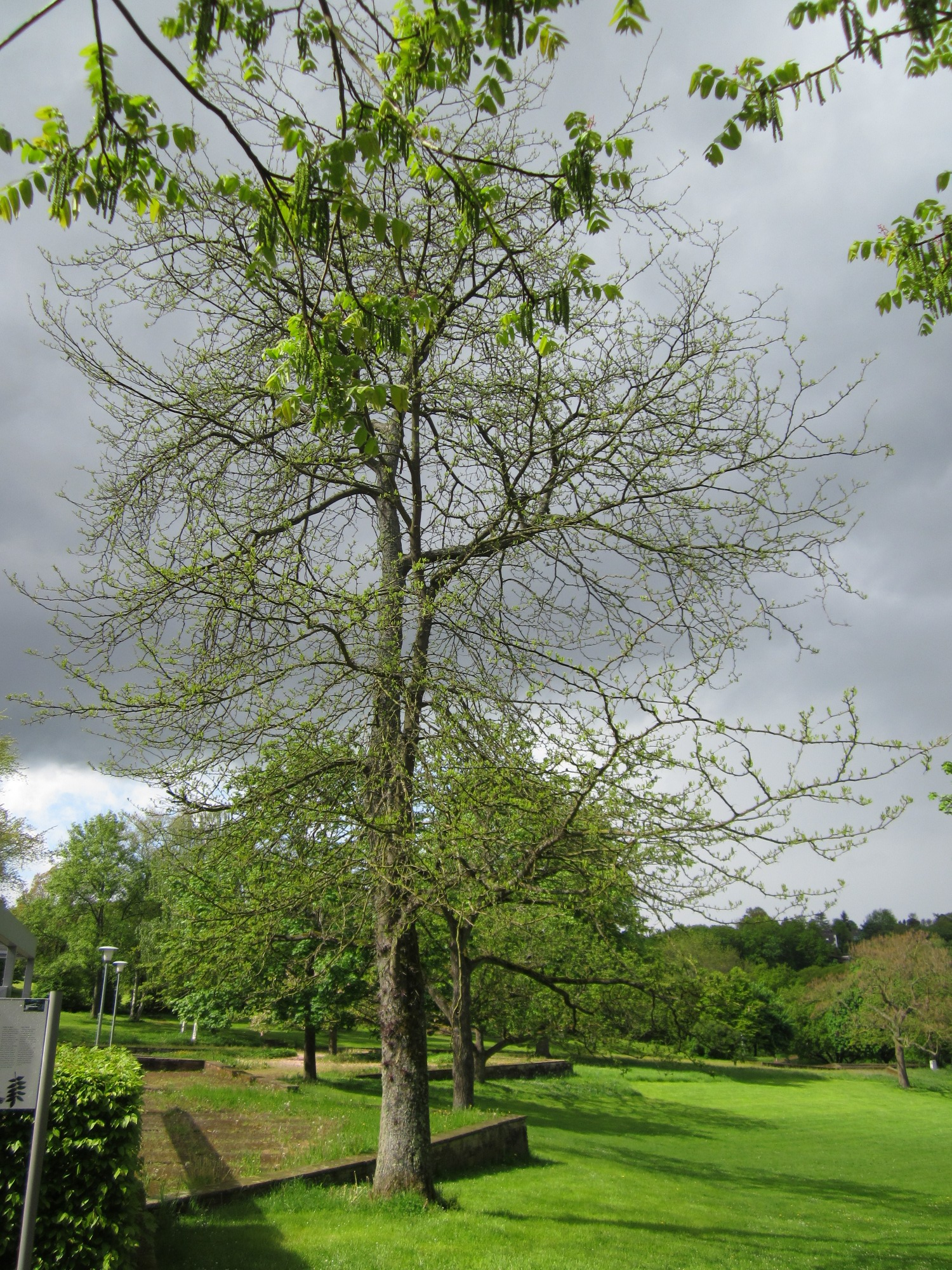 Chinesische Gleditschie (Gleditsia sinensis) im Deutsch-Französischem Garten in Saarbrücken